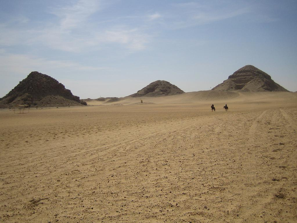 Abusir, Pyramiden von Sahure, Nuiserre u. Neferirkare (von links nach rechts)